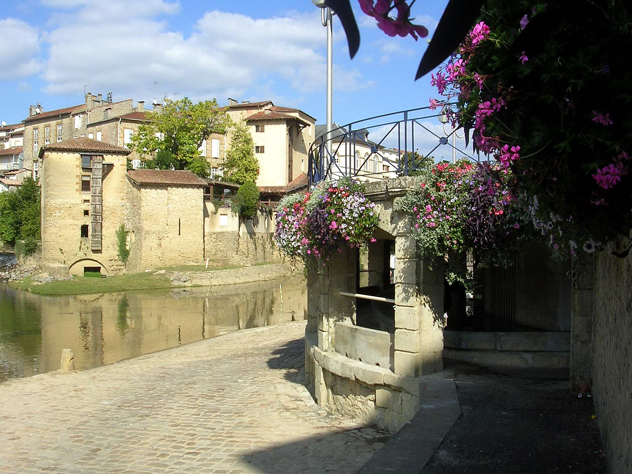 Cale de l'abreuvoir, site de l'ancien port fluvial de Mont-de-Marsan. On y voit l'ancien lavoir et l'ancienne minoterie, aujourd'hui galerie d'art.